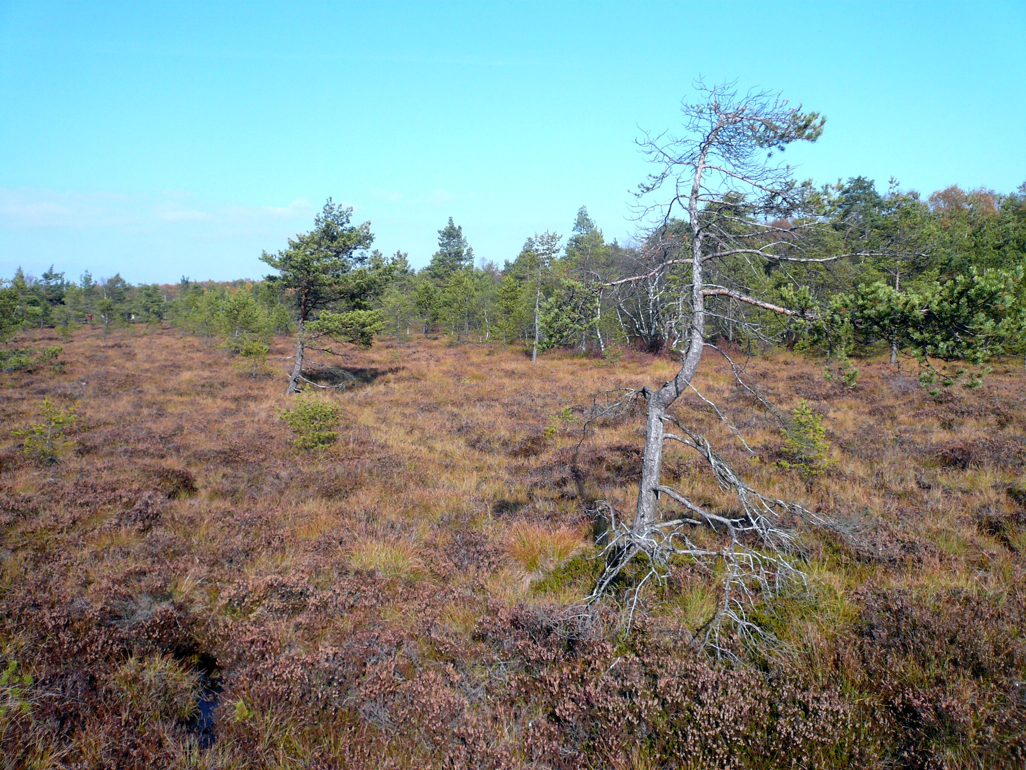 Schwarzes Moor